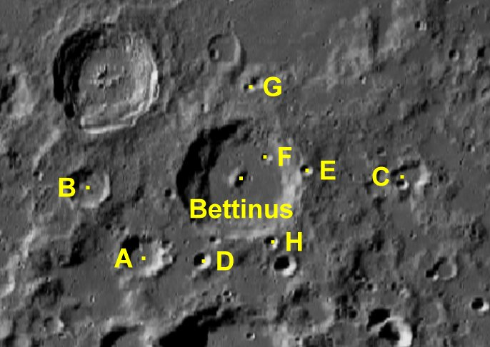 Cráter lunar Bettinus. Cráteres satélite. (Imagen LRO)